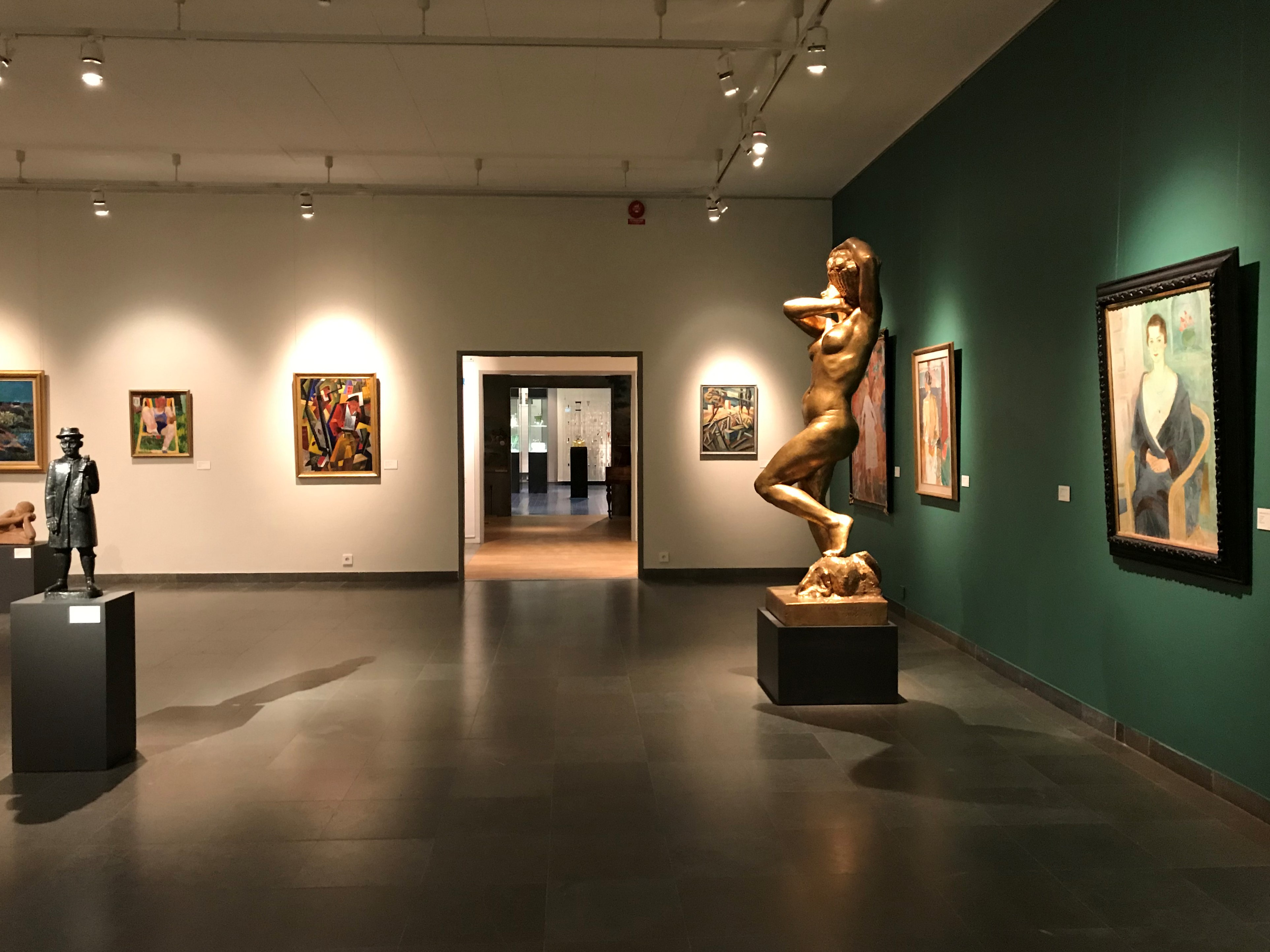 Länsmuseet Gävleborg, del av Rettigs konstsalar